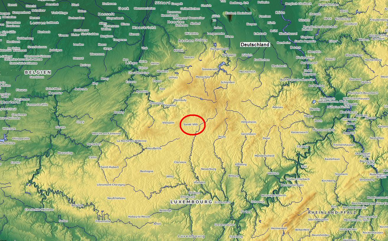 Lagedarstellung von Sankt_Vith Zentral im grenzüberschreitenden linksrheinischen Schiefergebirge. Zentral in den Ardennen und der belgischen Eifel, das der Autor als das Hochland der Ardennen betrachtet, begrenzt durch Maas, Semois, Mosel, Rhein.